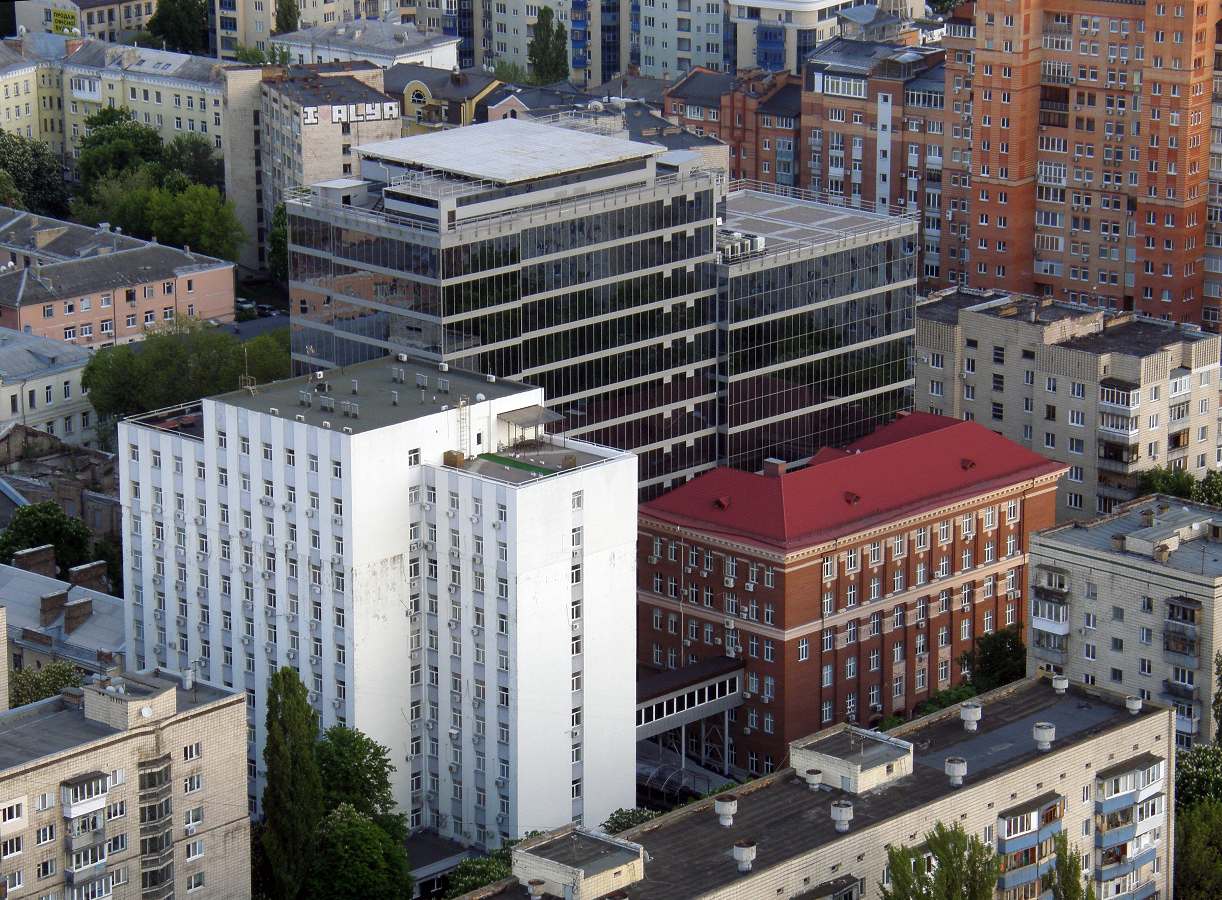 генеральная прокуратура Украины